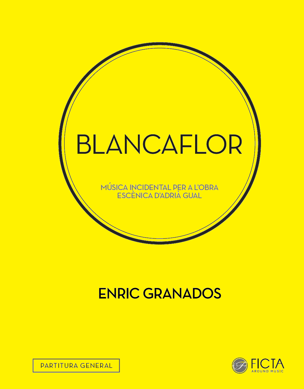 Portada de la primera edició de la partitura de Blancaflor d'Enric Granados. Edició a cura de Josep Dolcet publicada per FICTA edicions.